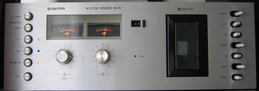 Magnetoofn stereofoniczny Finezja M512SD produkcji ZWM "UNITRA Lubartów"